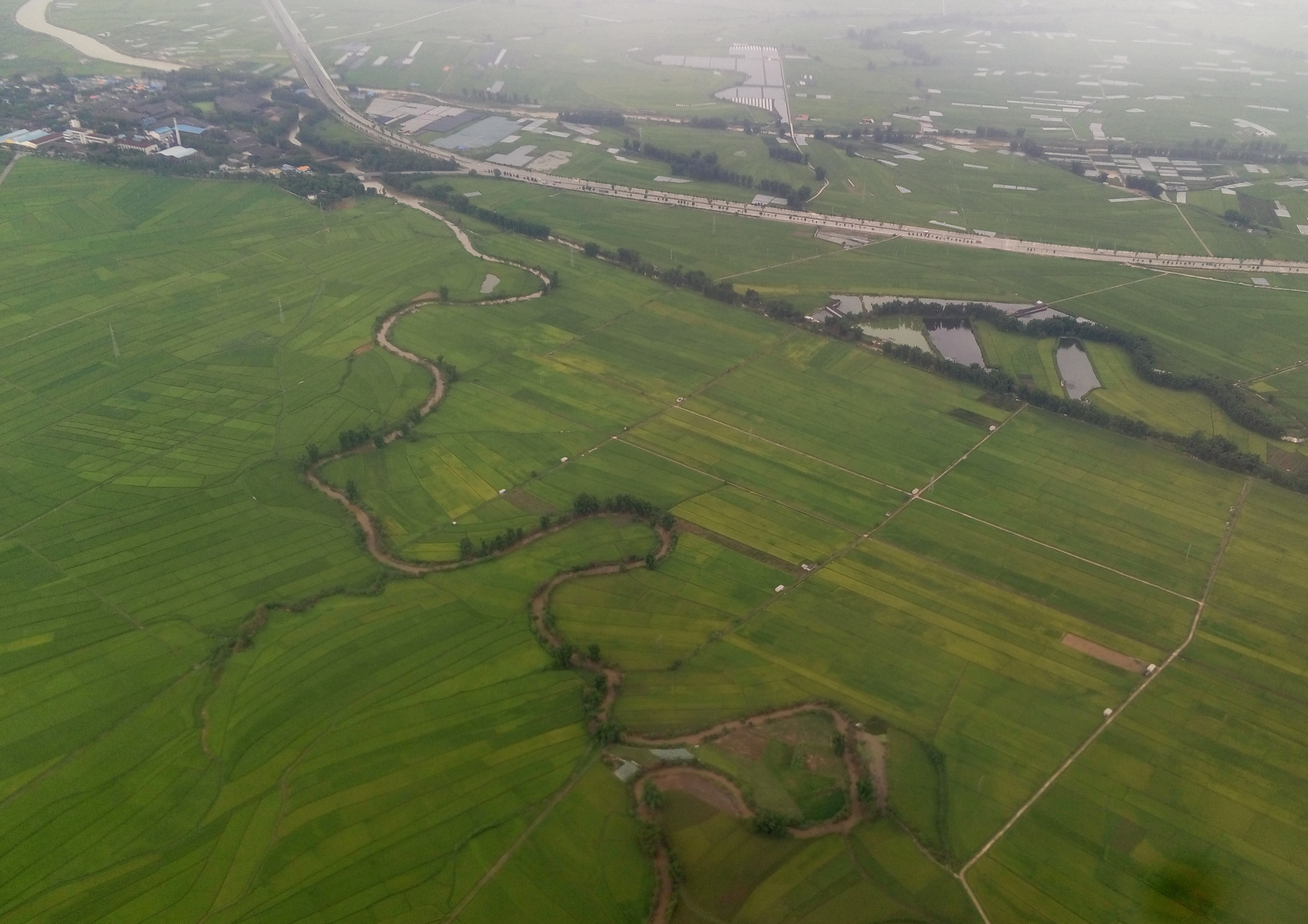 中文（中国大陆）: 从德宏芒市机场刚起飞的班机上拍摄的风平镇周围稻田